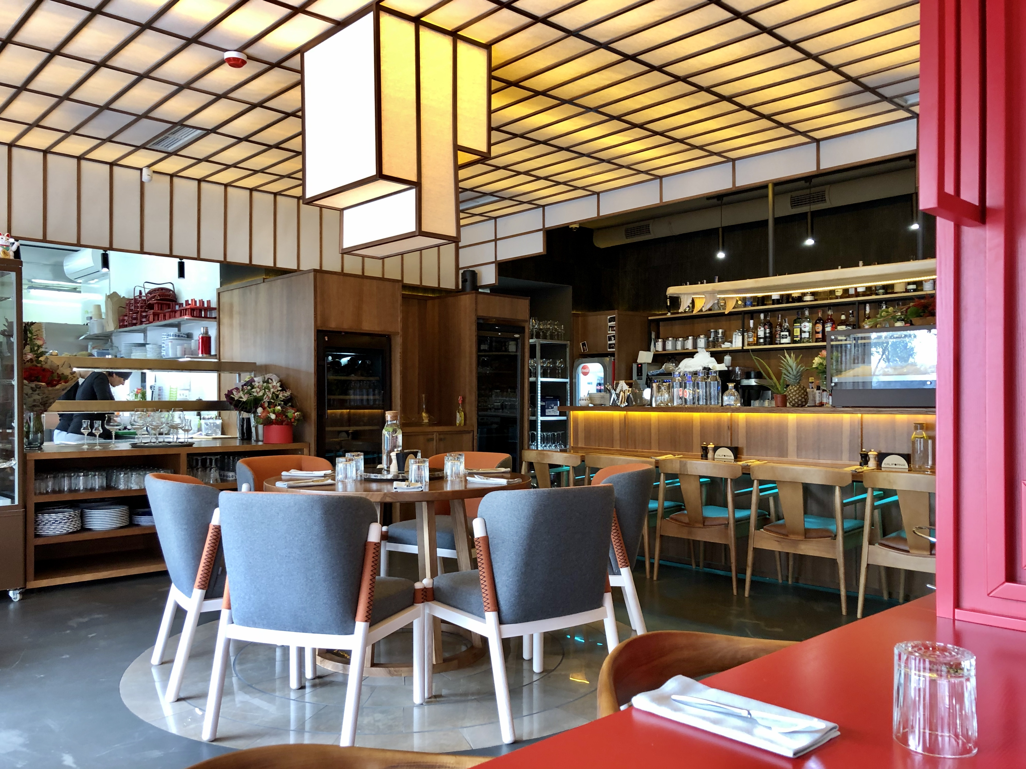 Проєкт студії YUDIN Design